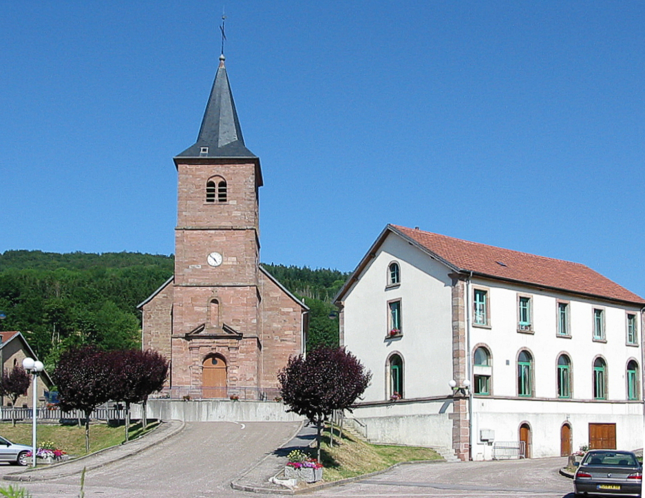 Tendon Commune du canton de Remiremont (Vosges) Église et mairie Photo personnelle du 1er juillet 2006. Copyright © Christian Amet